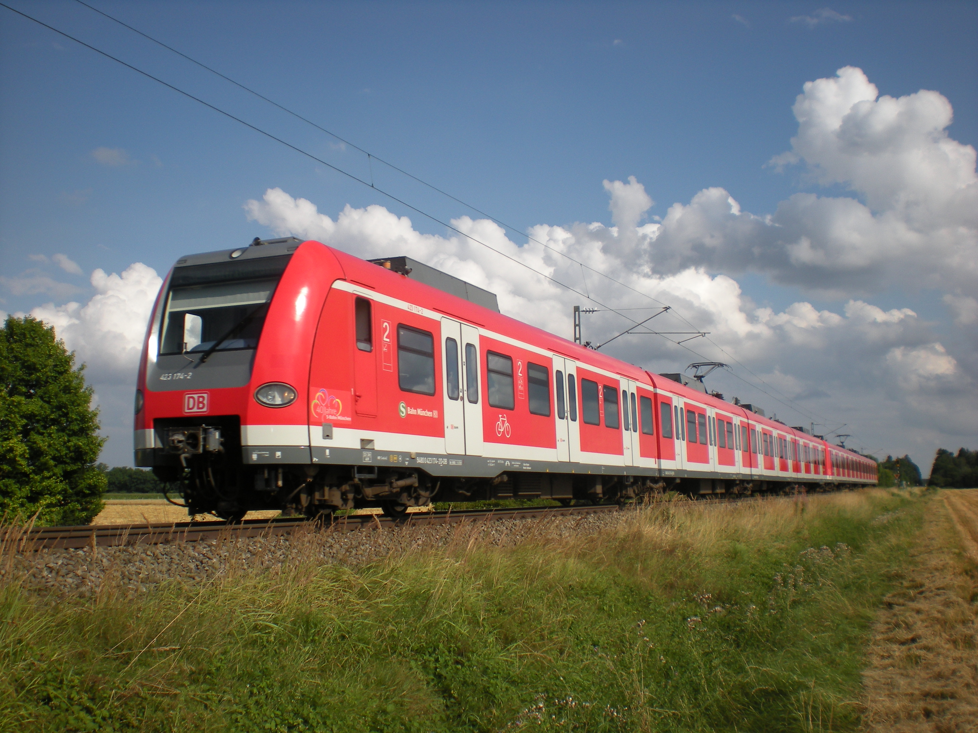 Zug der Münchner S-Bahnlinie S7 mit Baureihe 423 auf der Bahnstrecke München-Giesing–Kreuzstraße zwischen Hohenbrunn und Wächterhof